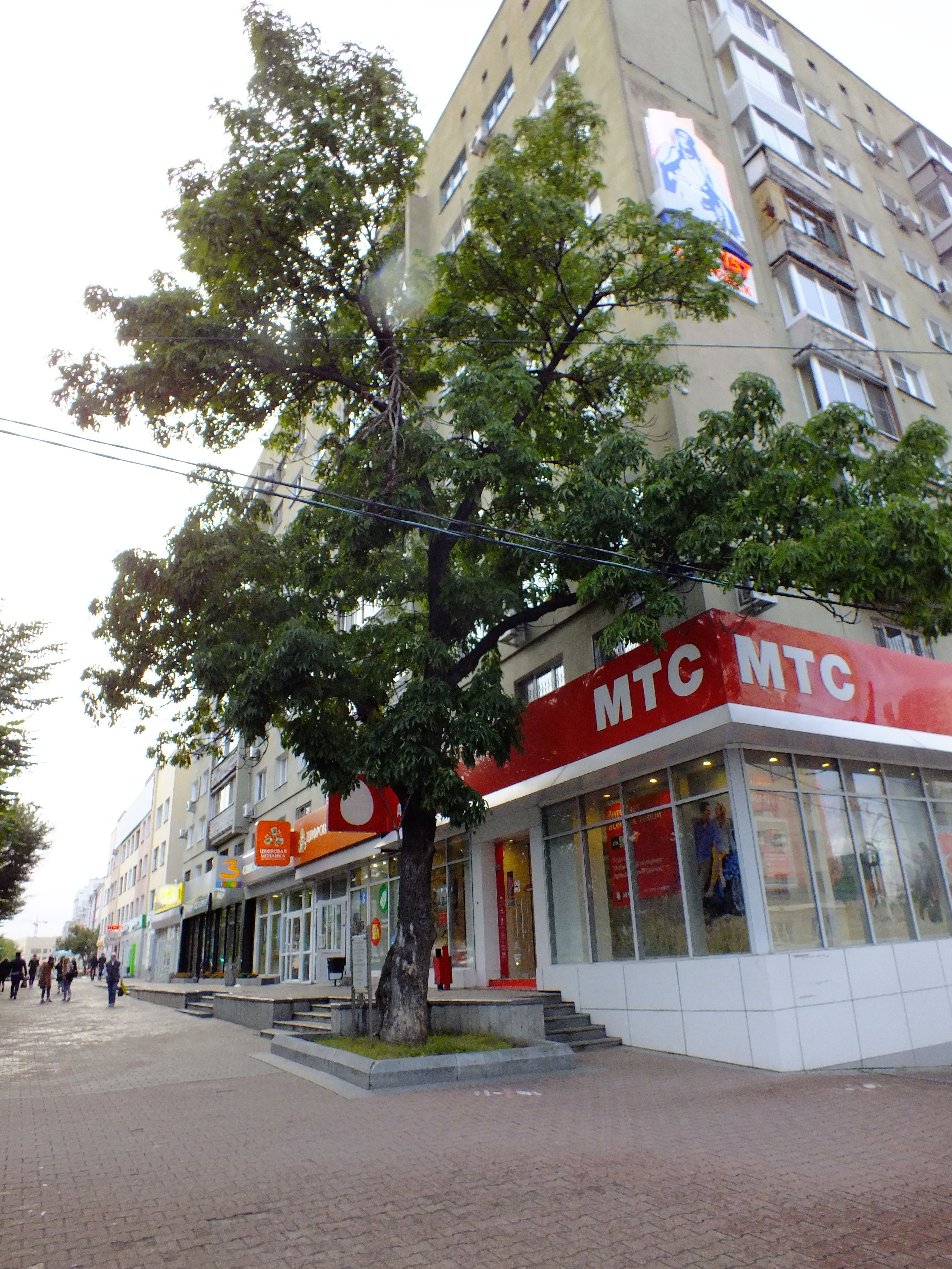 Маньчжурский ясень, посаженный в 1911 году Владимиром Арсеньевым и его братом Александром в честь приезда последнего. Памятник живой природы. Хабаровск, перекрёсток ул. Муравьёва-Амурского с ул. Шеронова